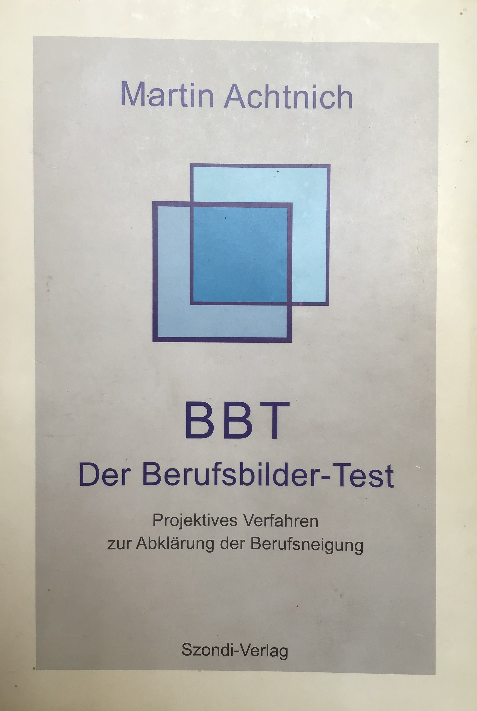 Buchcover BBT, Berufsbilder-Test